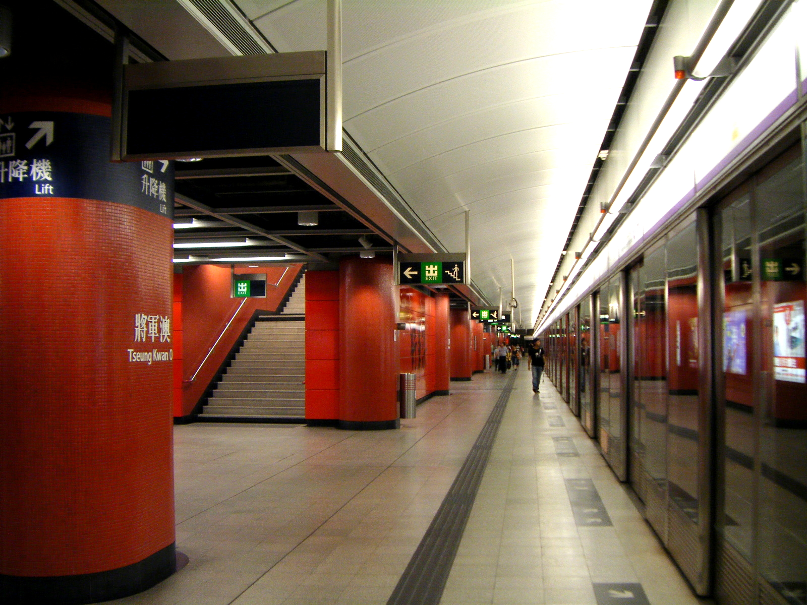 中文（香港）: 港鐵將軍澳站月台